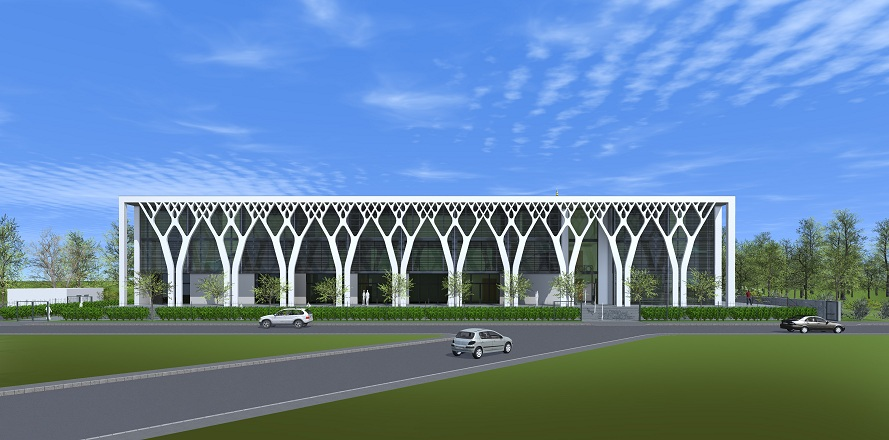 facade